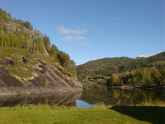 Flå, Stavn, Hallindal